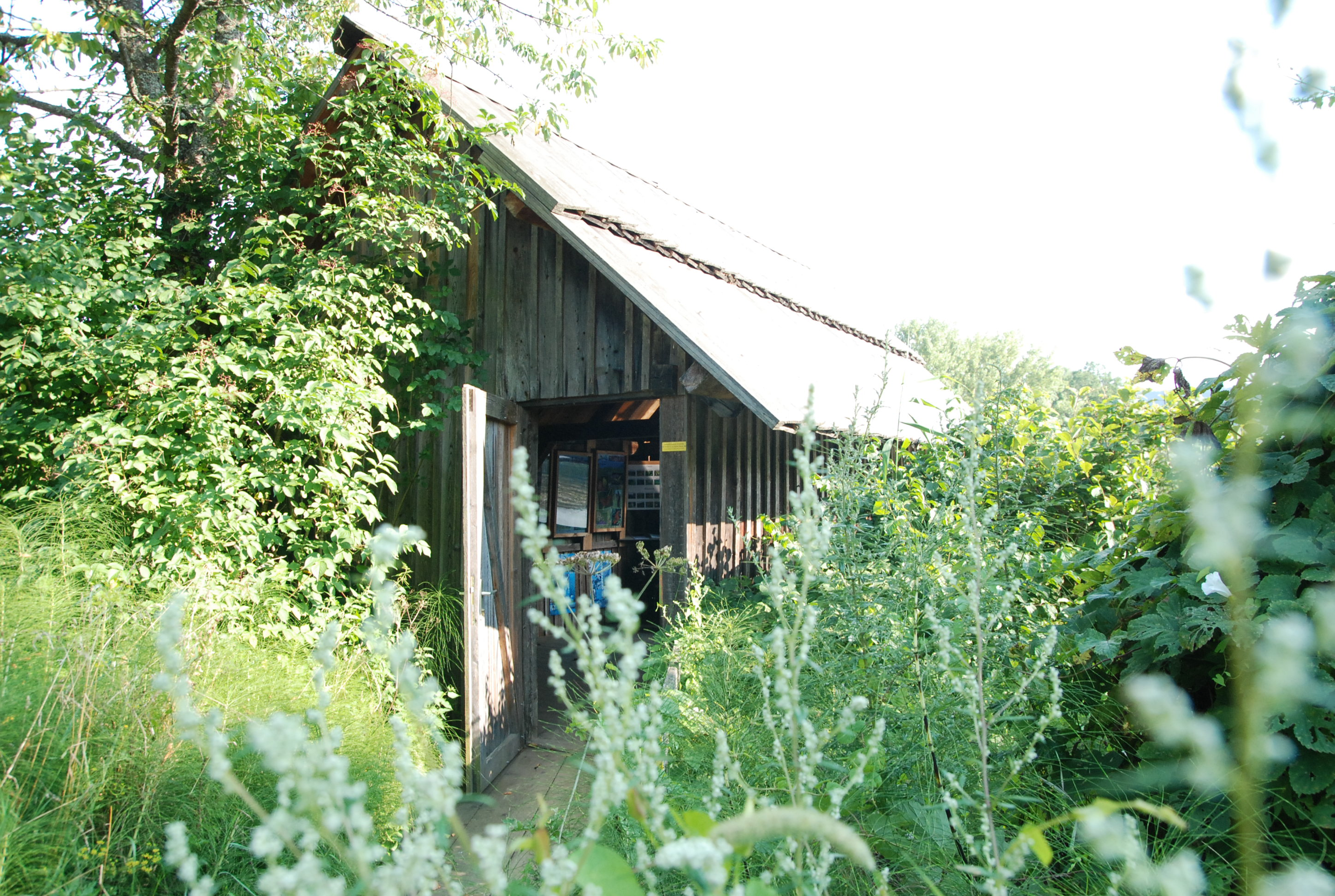 Das idyllische Bootshaus des Sablatnigmoors wird vor allem für die Beobachtung der Wasseroberfläche genutzt.